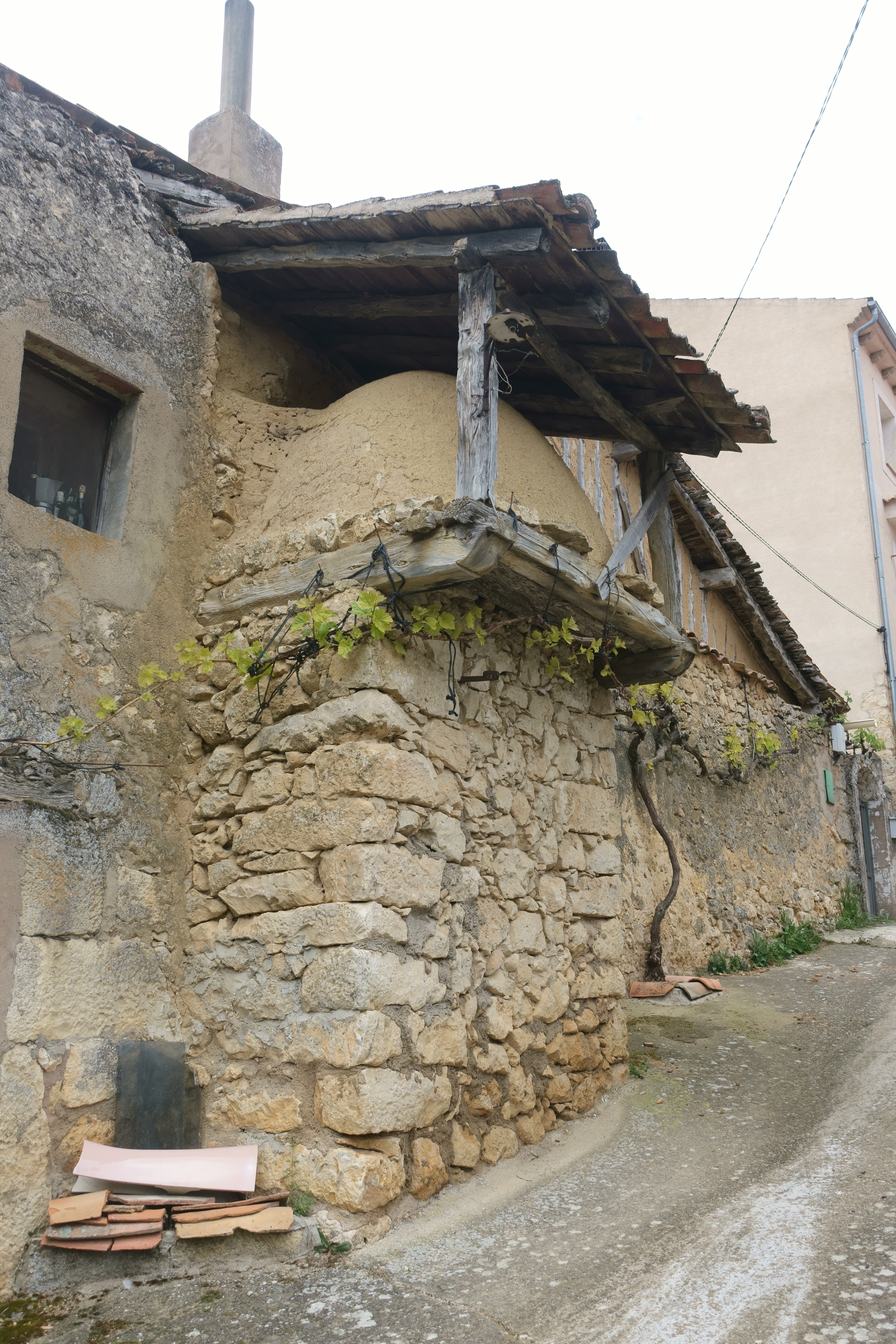 Horno tradicional en Castrojimeno (Segovia, España).